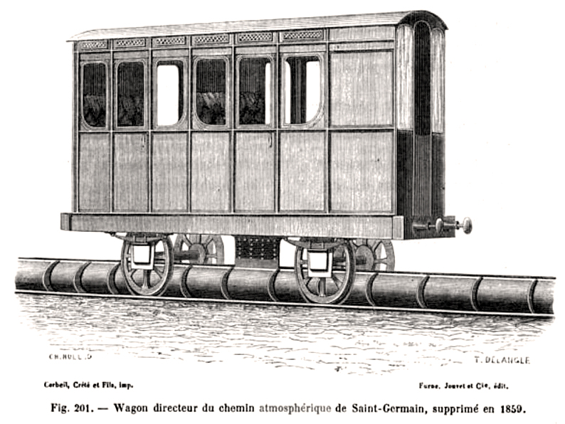 Fig. 201 Wagon directeur du chemin atmosphérique de Saint-Germain, supprimé en 1959